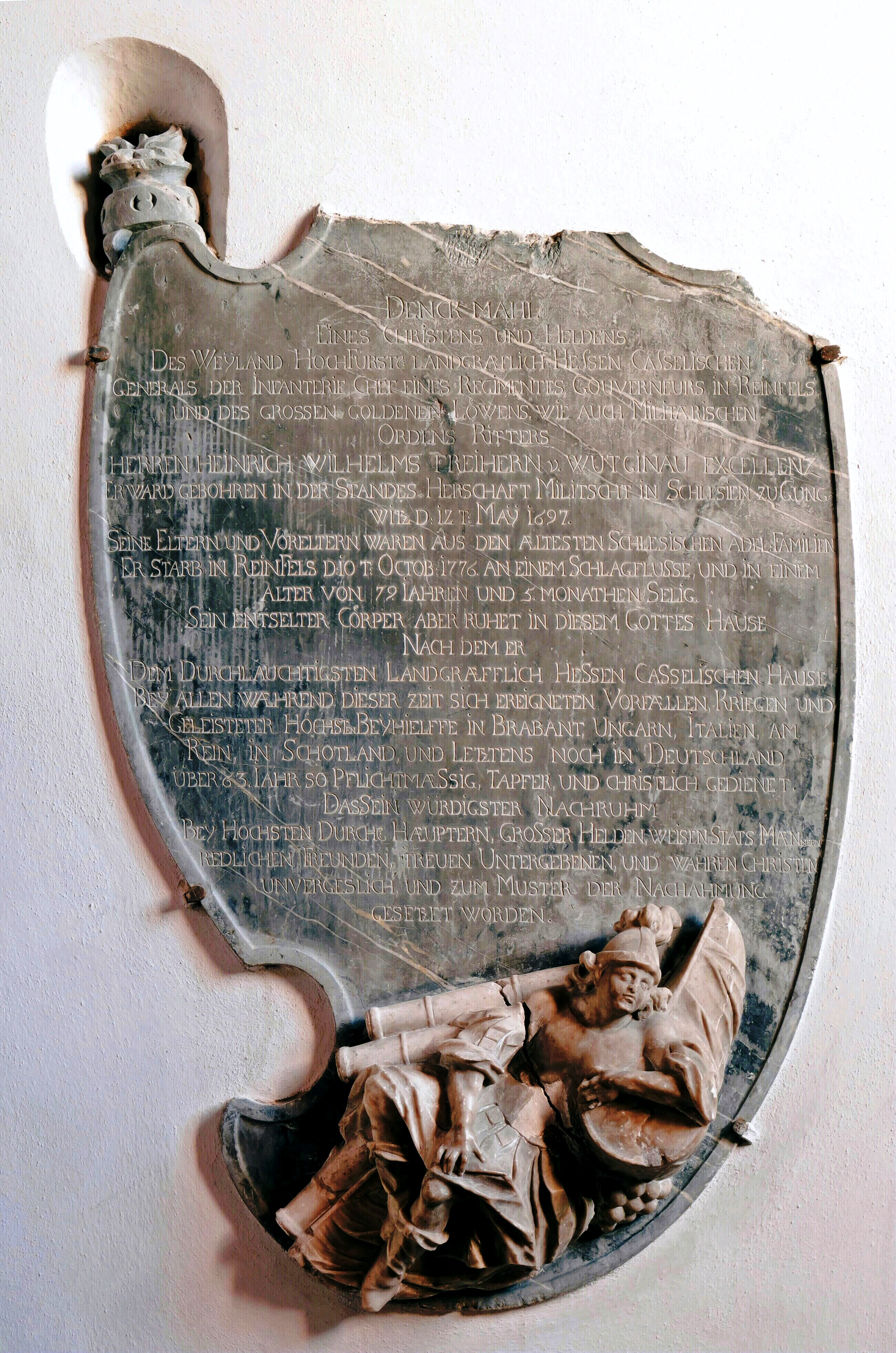 Epitaph des Heinrich Wilhelm von Wutginau in der Stiftskirche von Sankt Goar (Schiefer und Marmor)